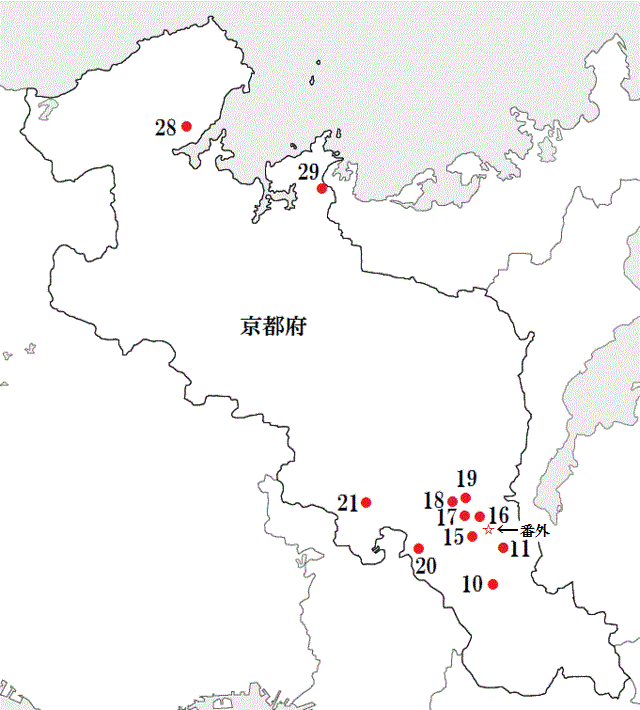 西国三十三所のうち京都府にあるもの